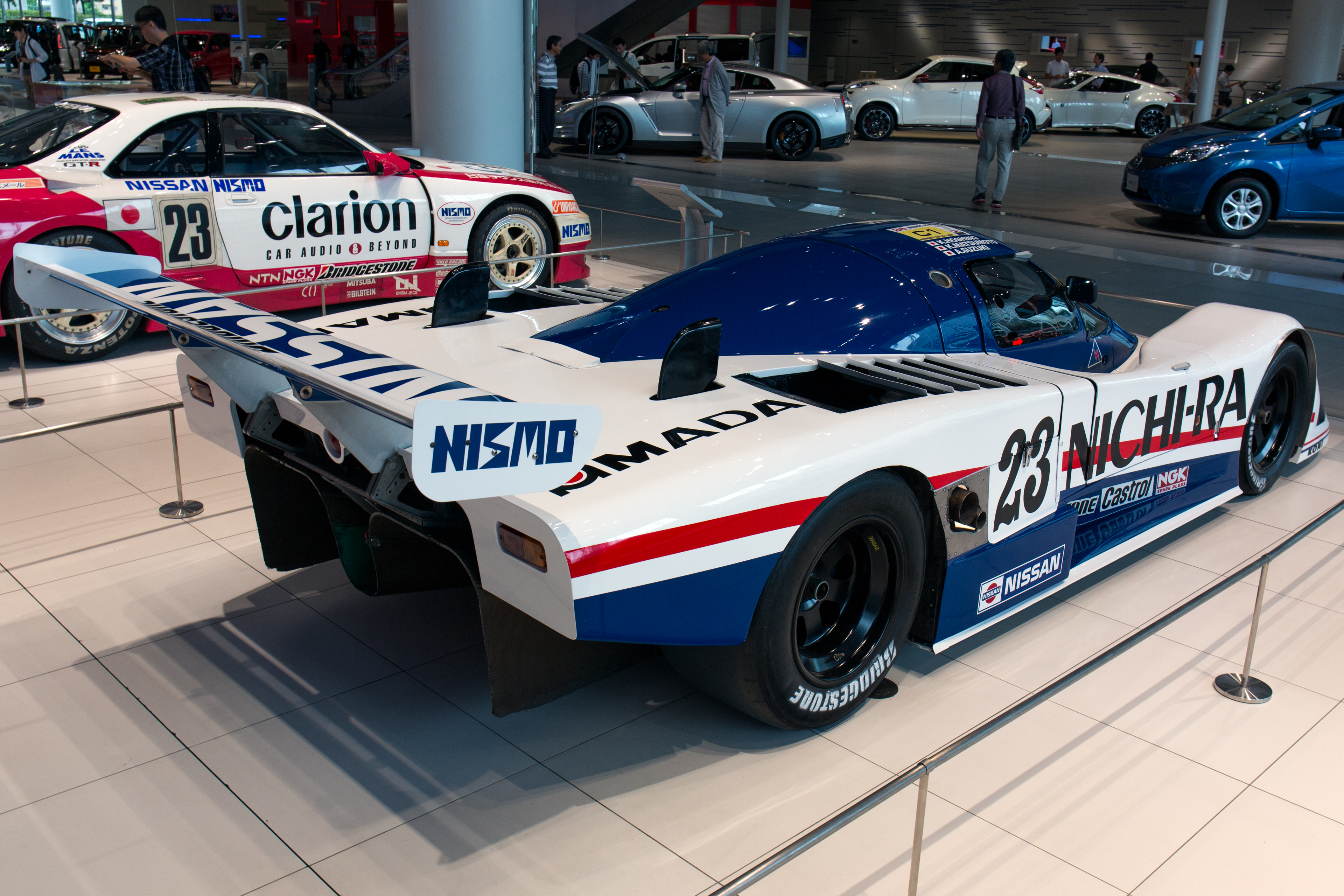 1986 Nissan R86V